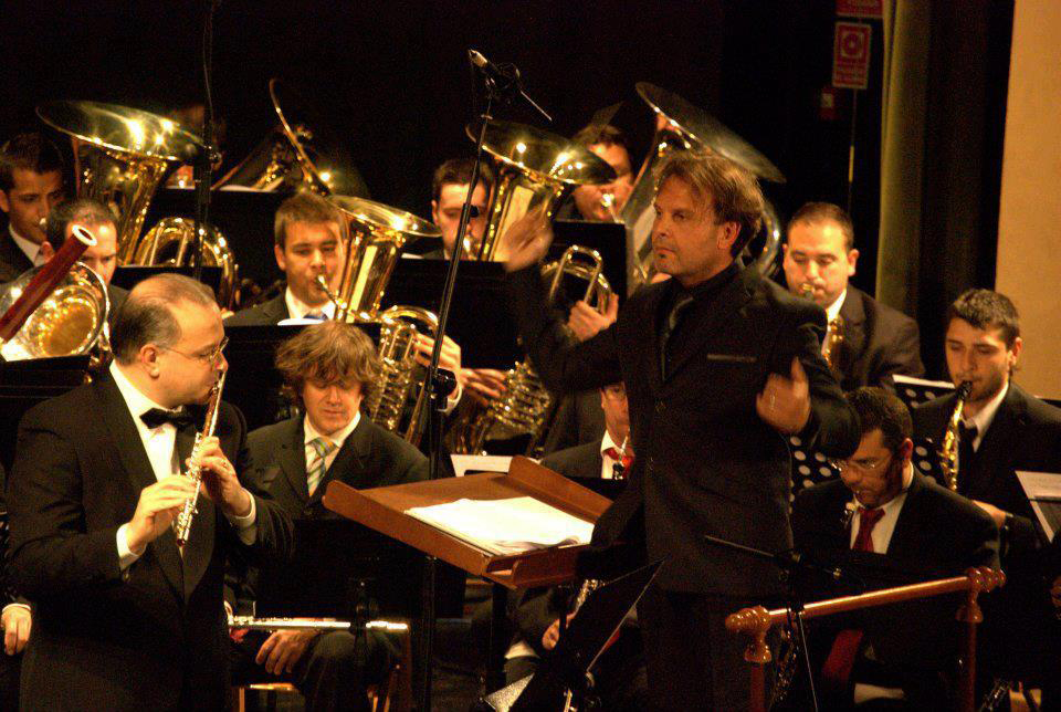 dirige la Banda de Valencia